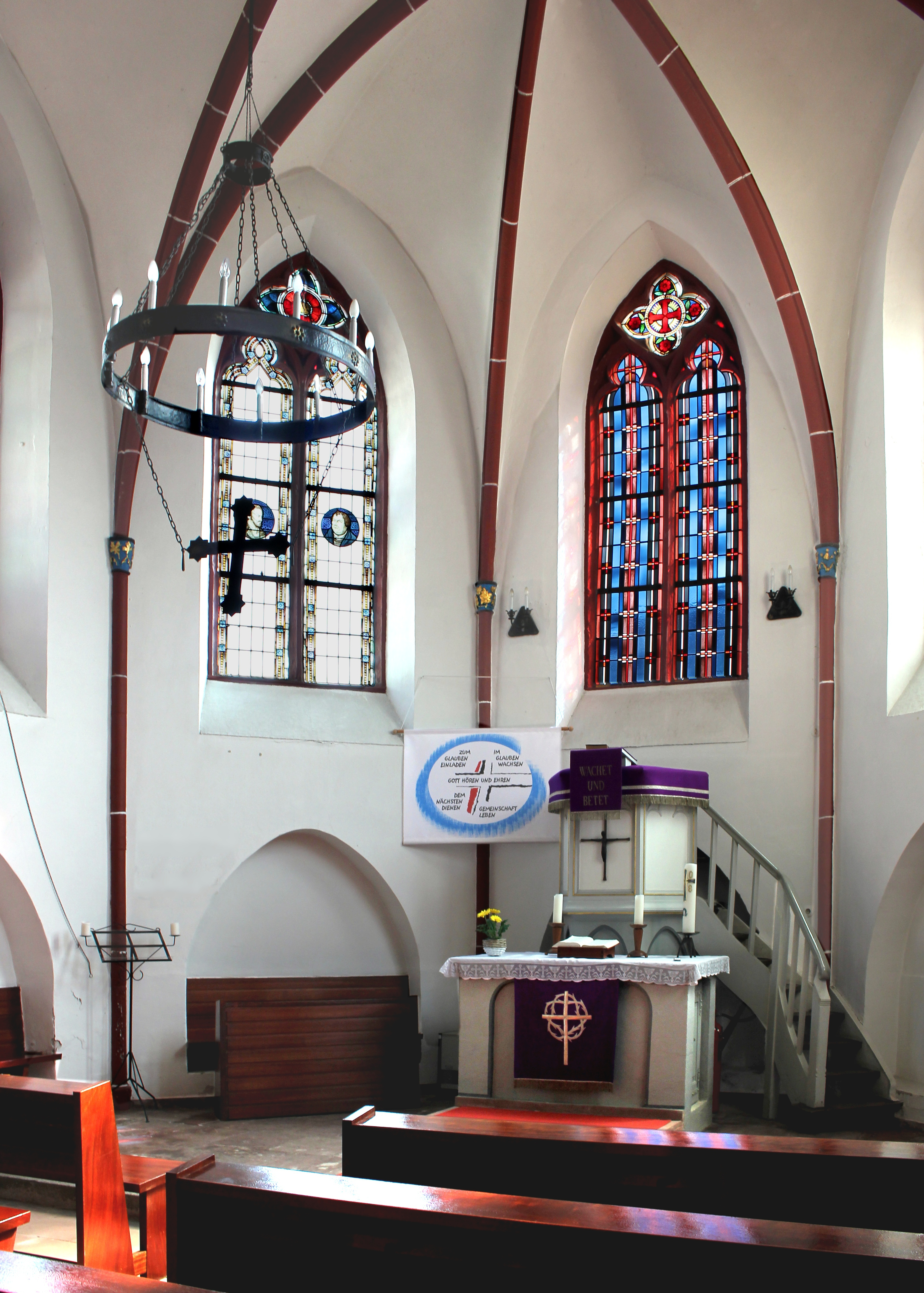 Chor der Georgskapelle in Karden, Moselstraße, erbaut um 1340, zum Stift St. Castor gehörend, 1805 nach der Enteignung durch die französische Verwaltung profaniert und als Pferdestall zweckentfremdet, 1856 zur evangelischen Kirche umgebaut und 1857 eingesegnet, 1908/09 grundlegend restauriert. Seit 1968 heißt sie wieder Georgskapelle.